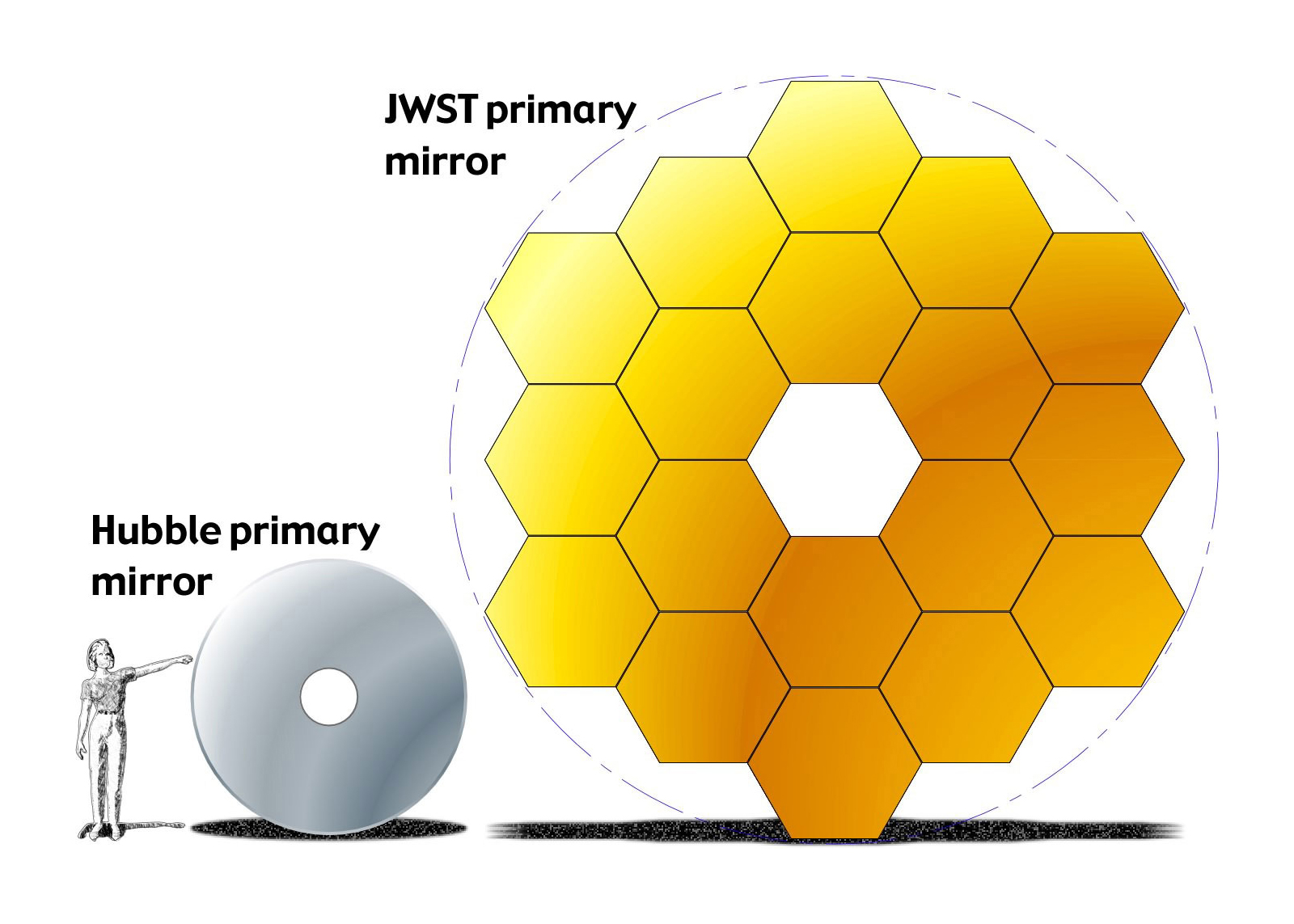 טכנולוגית המשושים ליצירת המראה הראשית של הטלסקופ